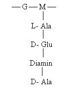 thanhson